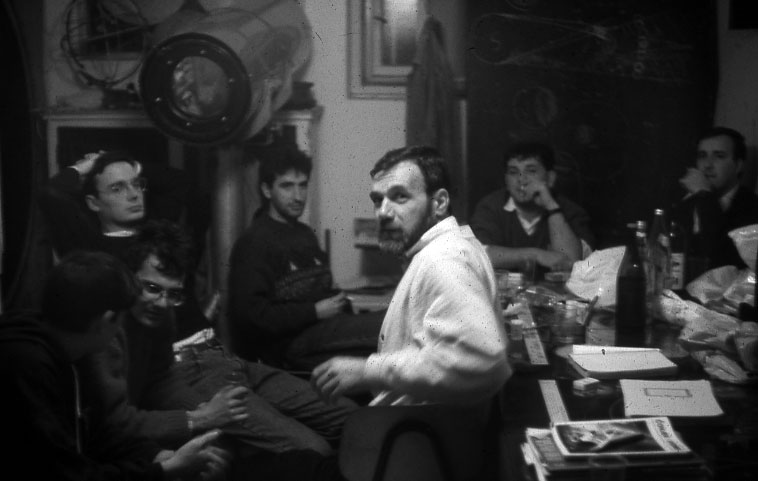 Debatna atmosfera u prostoriji Astronomskog društva (od 1985. godine Astronomskog društva "Faust Vrančić") u pomoćnoj prostoriji na zadnjem katu zgrade šibenske gimnazije. U prvom planu Miro Berić, slijeva u razgovoru je Drago Sirovica.